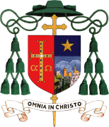 Stemma episcopale